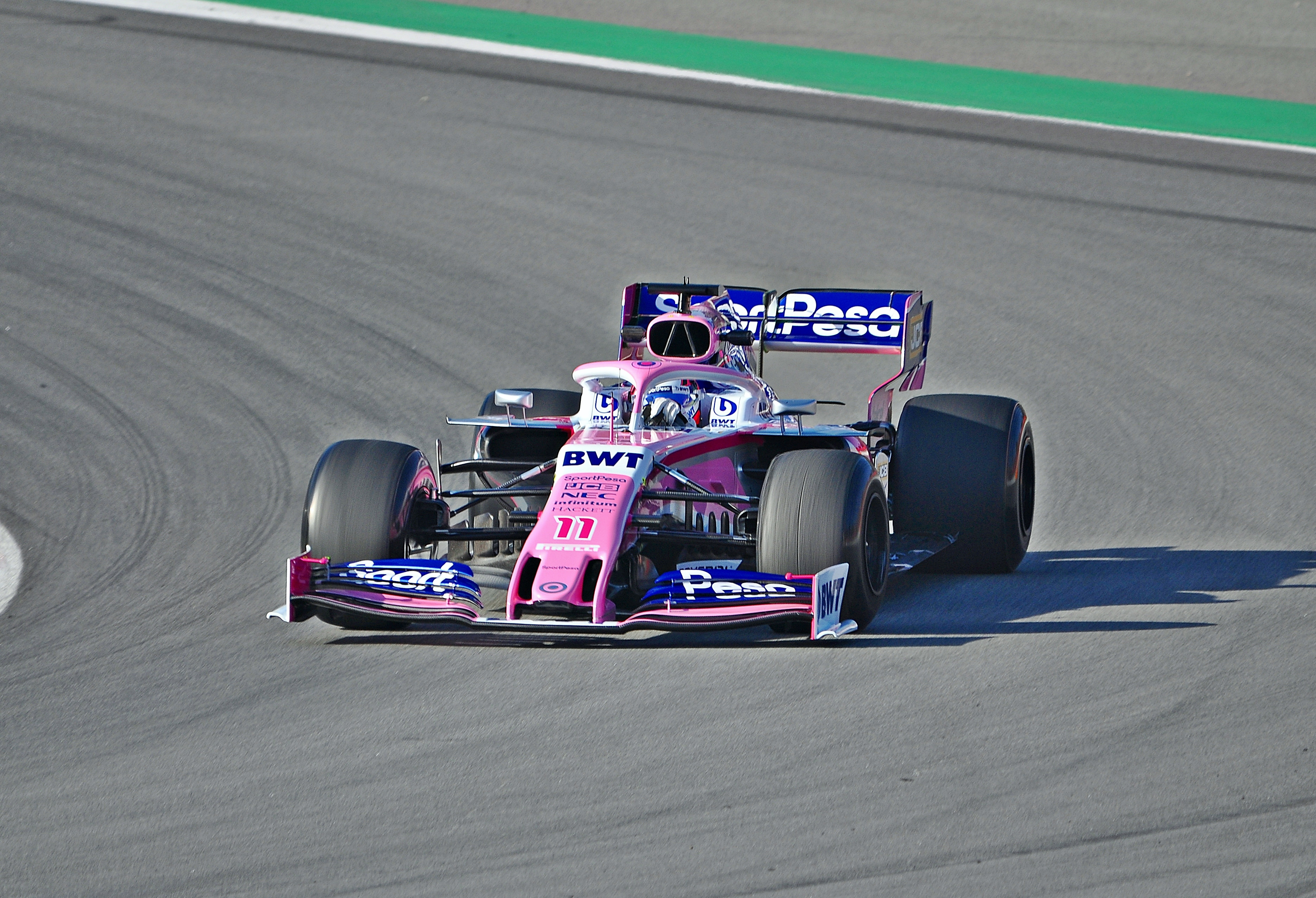 Test Days-Circuito de Catalunya